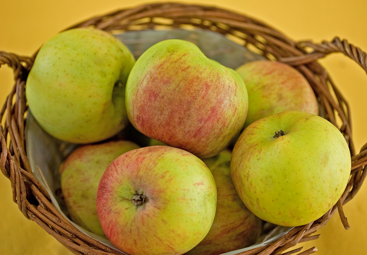 Der Berlepsch ist eine Apfelsorte